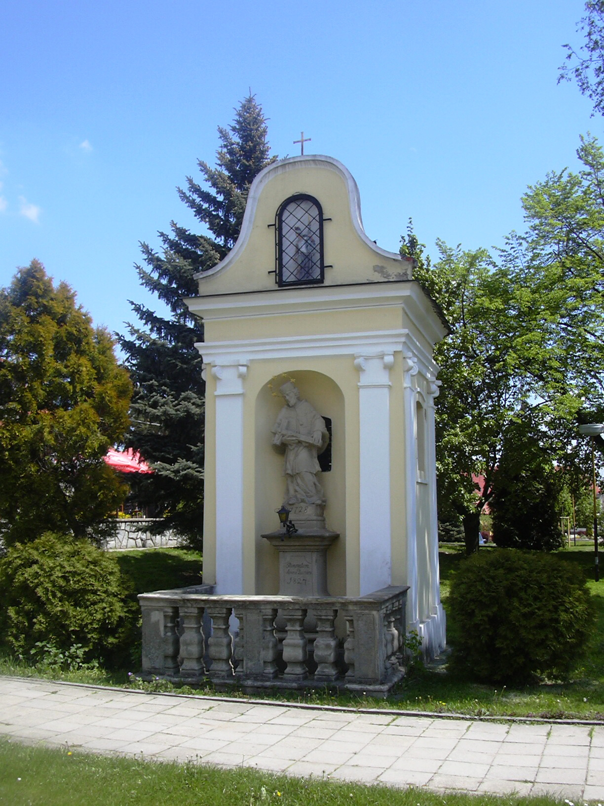 Zvonice se soškou sv. Jana Nepomuckého a sv. Floriana(Vyškov District, Czech Republic)